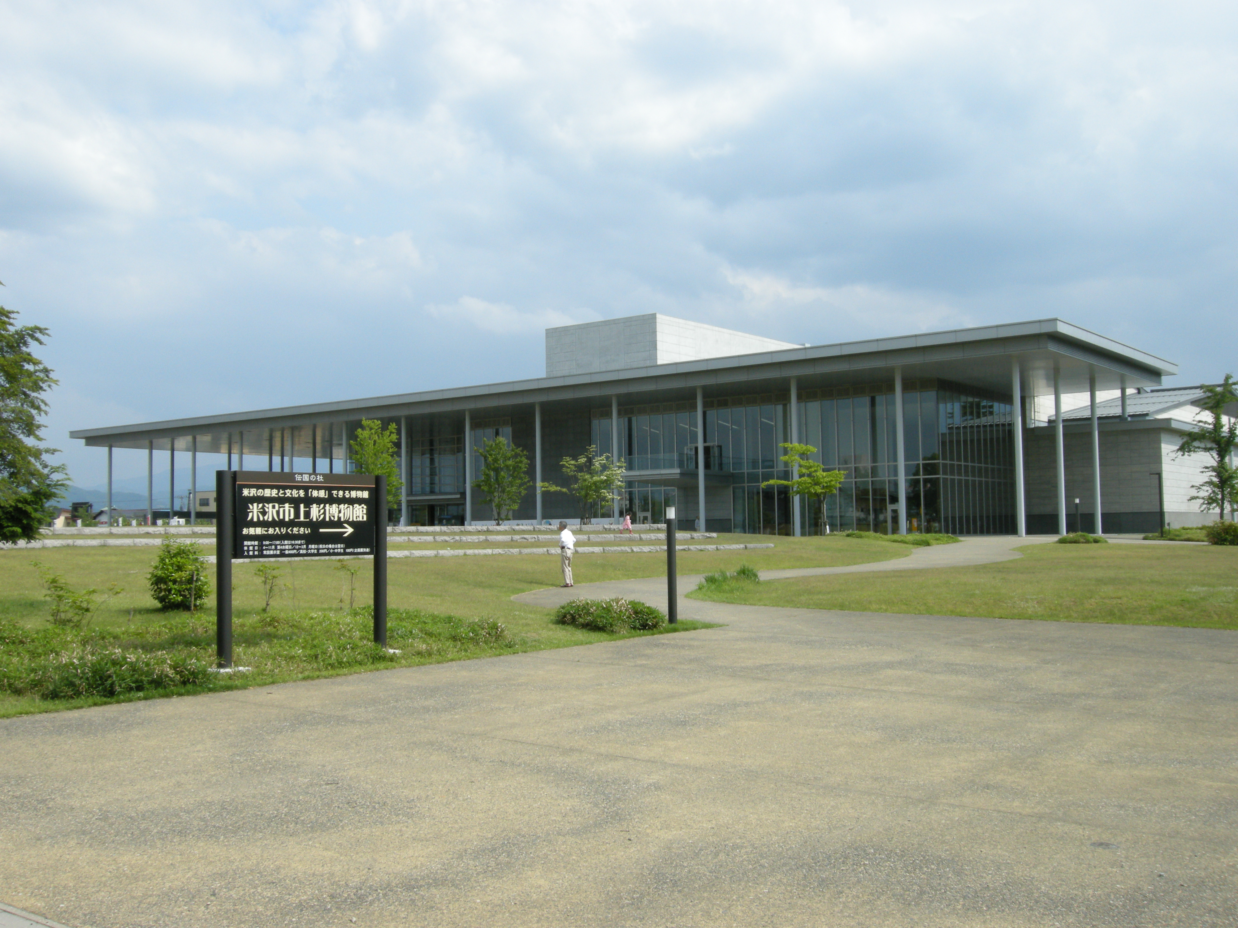 YONEZAWA CITY UESUGI MUSEUM